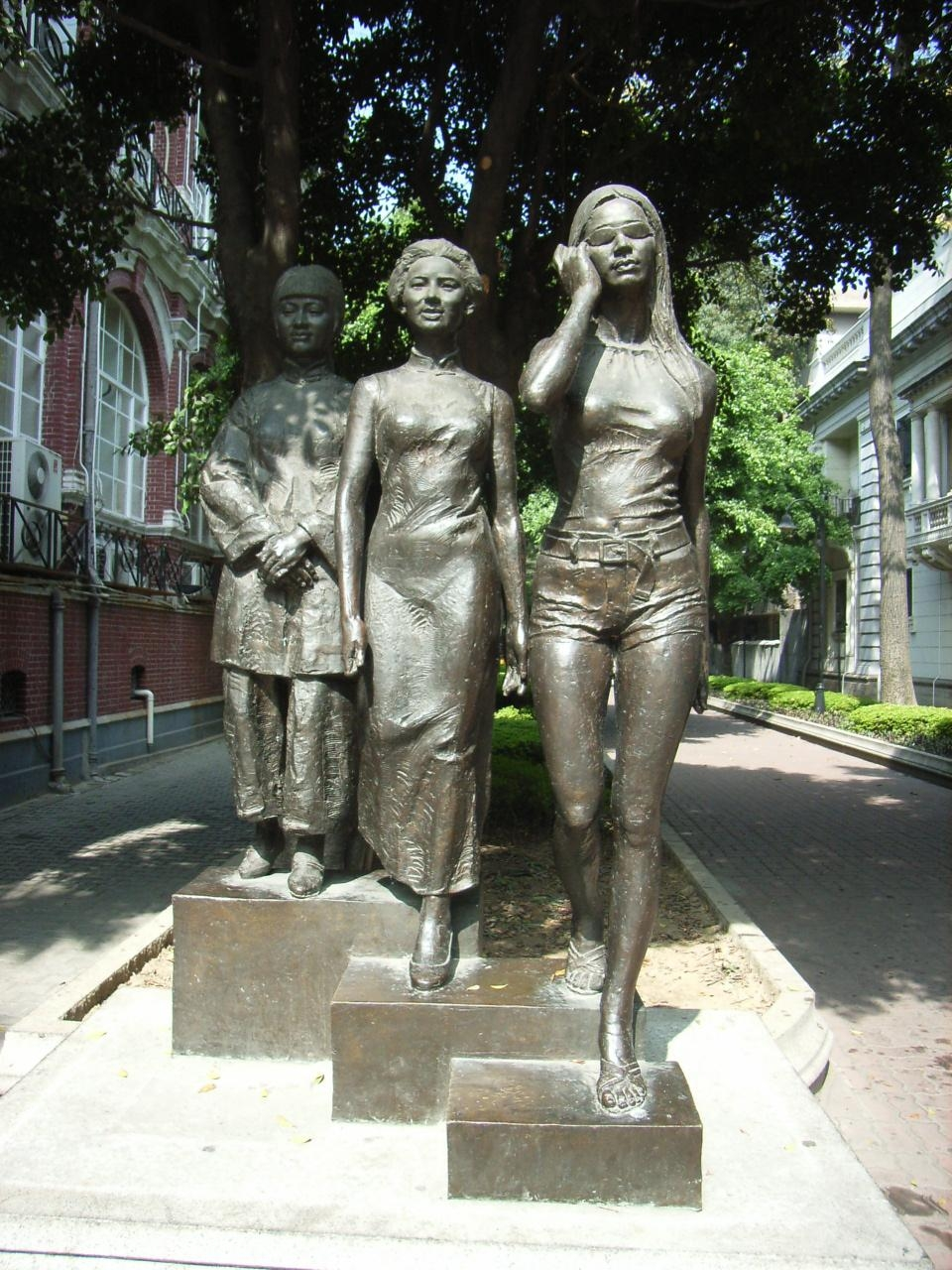 廣州沙面 建築群 近 白天鵝賓館, ShaMian, GuangZhou, PRChina